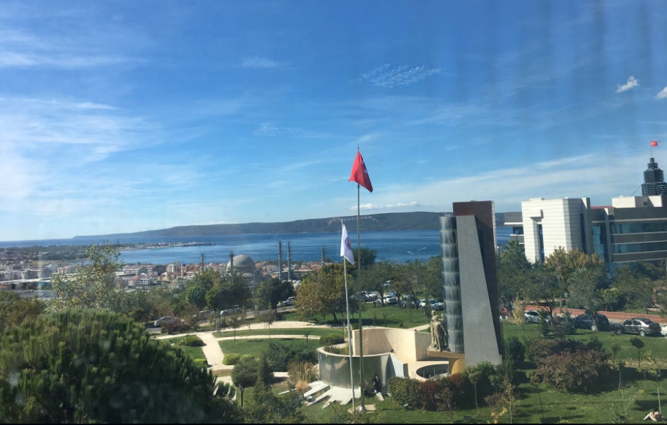 Çanakkale Siyasal kurum binasından batı cephesinden görüntüsü.